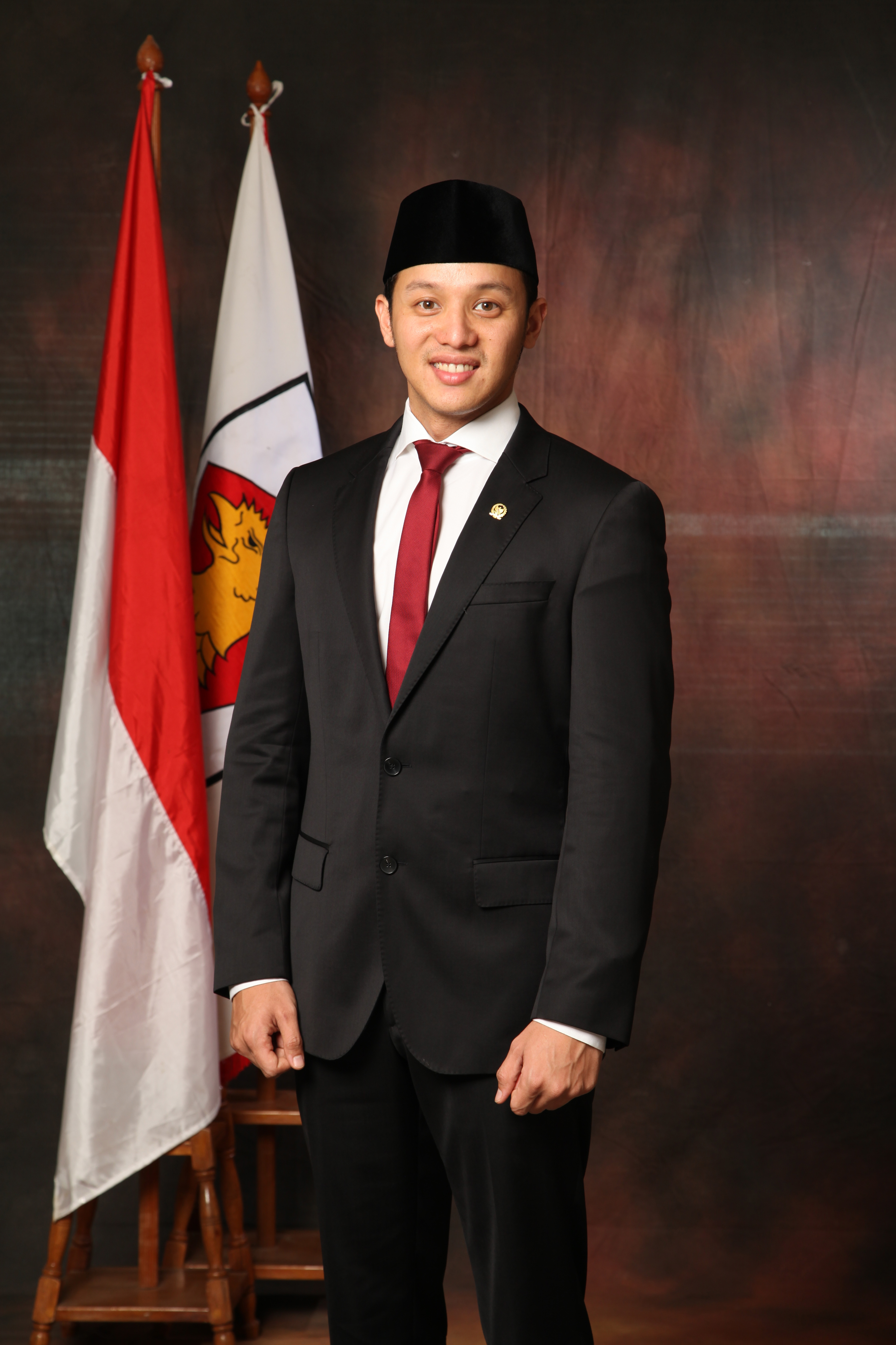 Moreno Soeprapto, pembalap Indonesia dan Wakil Rakyat dari Partai Gerindra